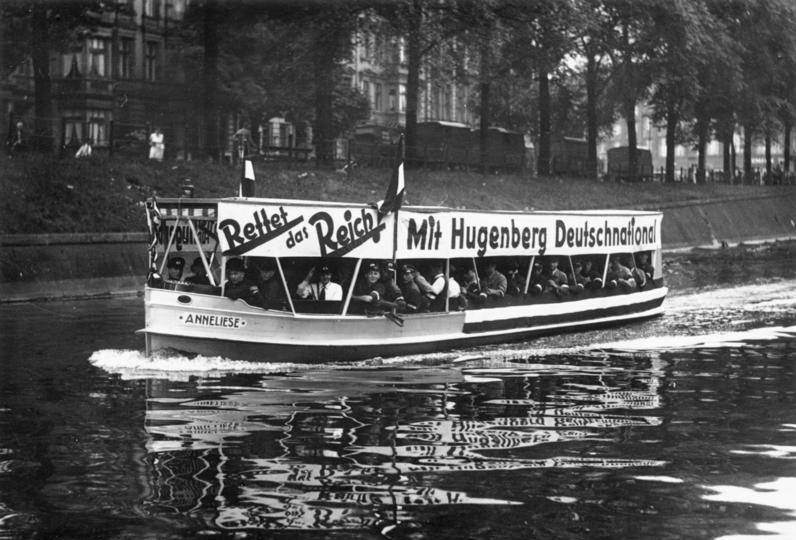 Berlin, zur Reichstagswahl, Werbefahrt der DNVP Scherl: Werbefahrt der DNVP, Am Sonntag veranstaltet die DNVP mittels eines Motorbootes eine werbefahrt durch berlin. UBz: Das Schiff auf dem Landwehrkanal (Hall.[isches] Tor) [Zur Vorbereitung der Reichstagswahl am 31.Juli 1932]